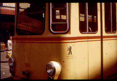 Für Karlsruhe einst typisch: Berliner Wappen und Bezirksname auf Straßenbahnwagen als Hinweis auf die Herkunft der Wagen aus Berlin (DWM/Waggon-Union) Foto: Mäfä Juli 1978